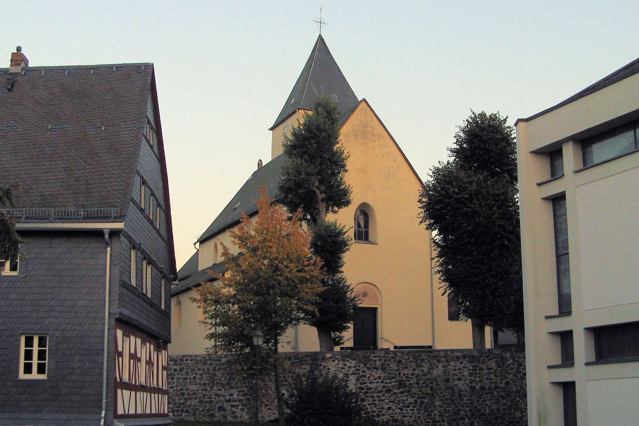 Romanische Pfeilerbasilika in Waldbrunn Lahr (Westseite) zwischen Pfarrhaus und Neuer Kirche